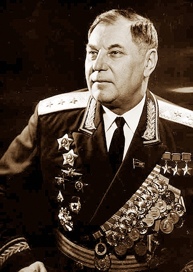 Заместитель главнокомандующего Войсками ПВО СССР генерал-полковник авиации Александр Иванович Покрышкин